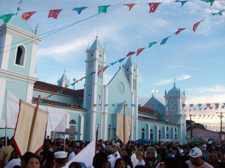 Igreja da Cidade de Borba - Amazonas - Brasil, durante a romaria da festa de Santo Antônio.